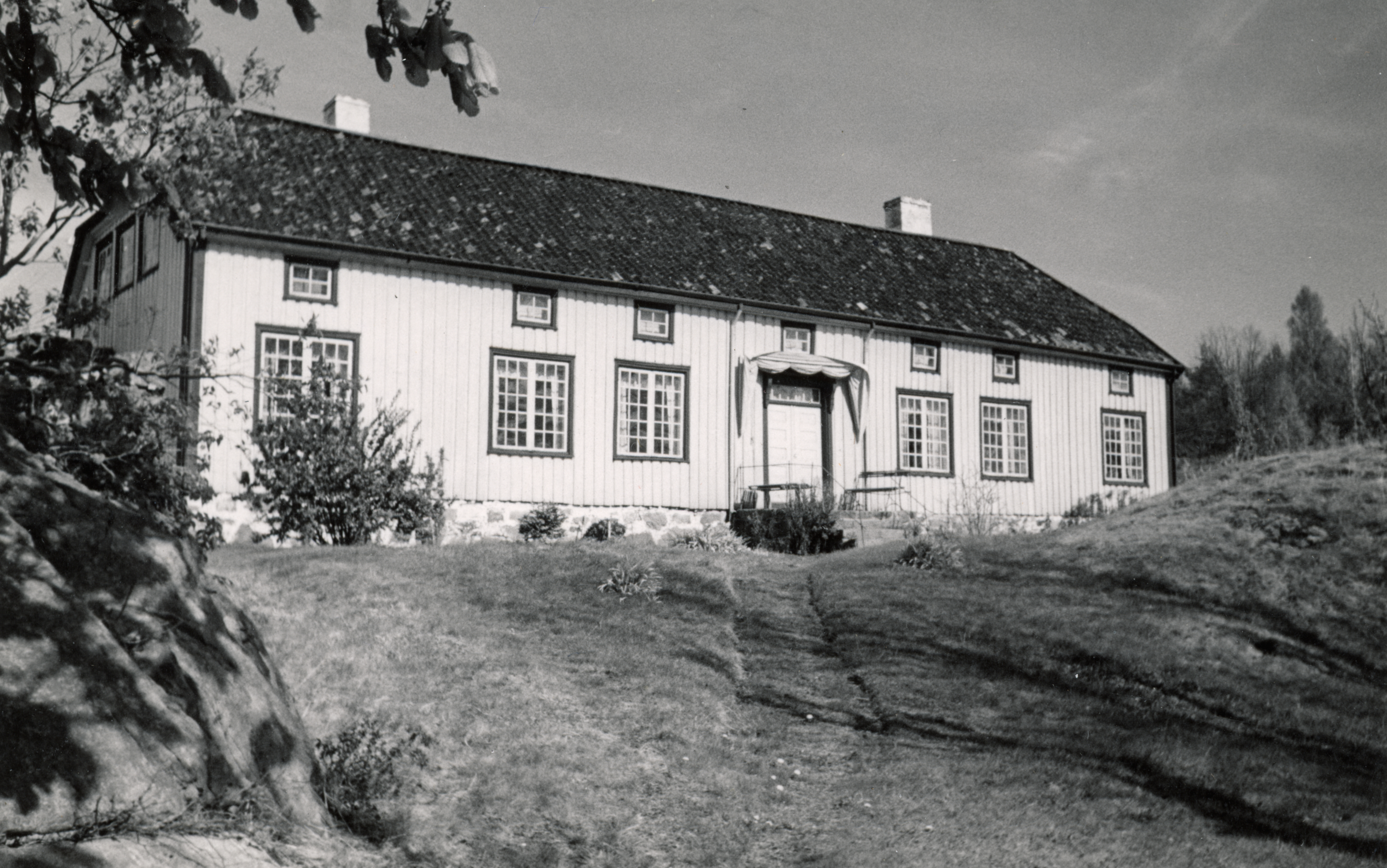 Vågsnes, Enkefru Hems hus, Aust-Agder This image on crowdsourcing geotagging platform Fotodugnad